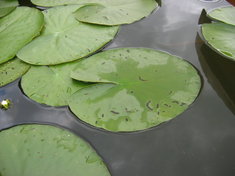 Weiße Seerose Nymphaea alba, Müritz-Gebiet